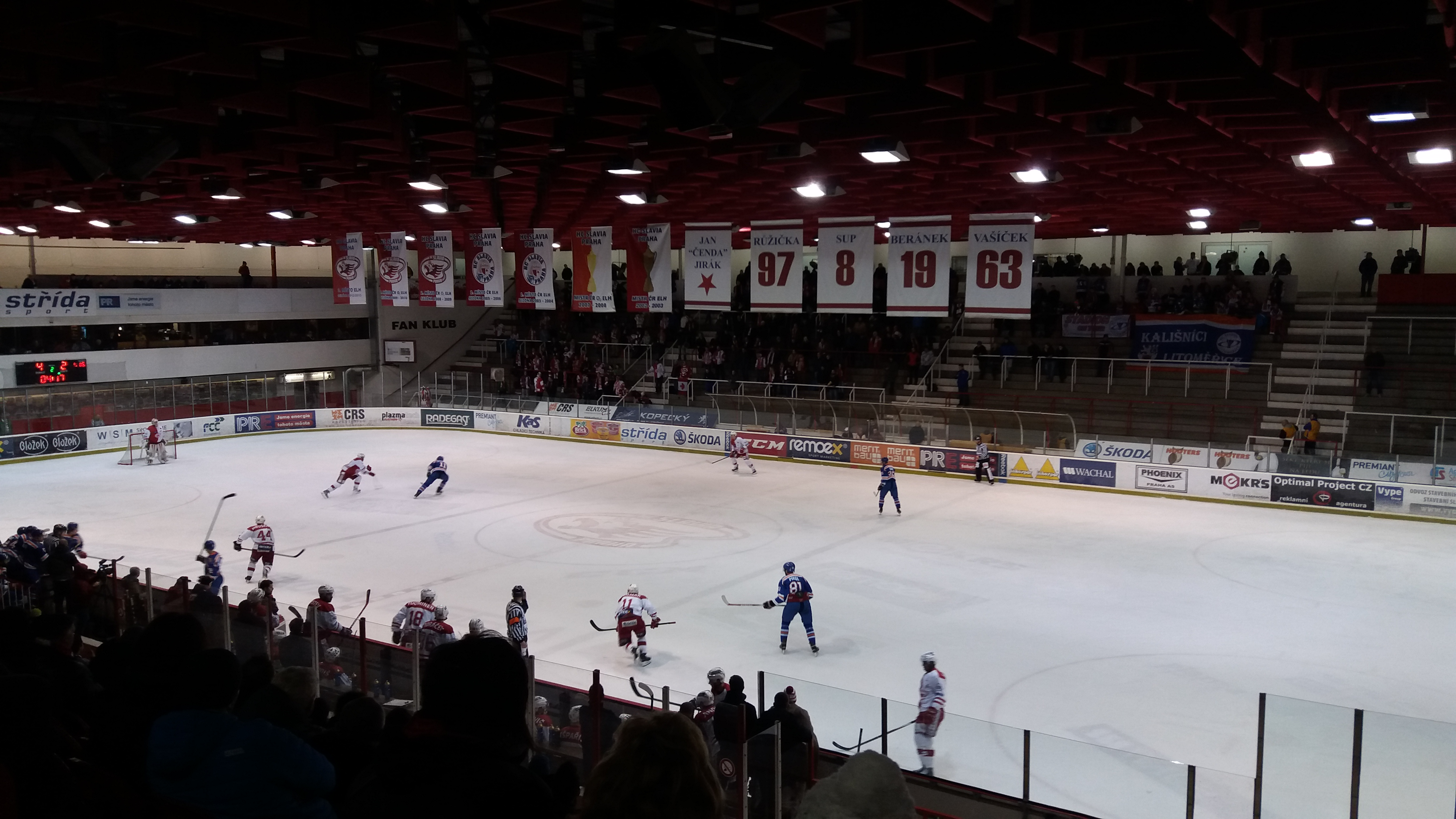 Momentka ze zápasu HC Slavia Praha - HC Stadion Litoměřice hraného na pražském zimním stadionu v Edenu.